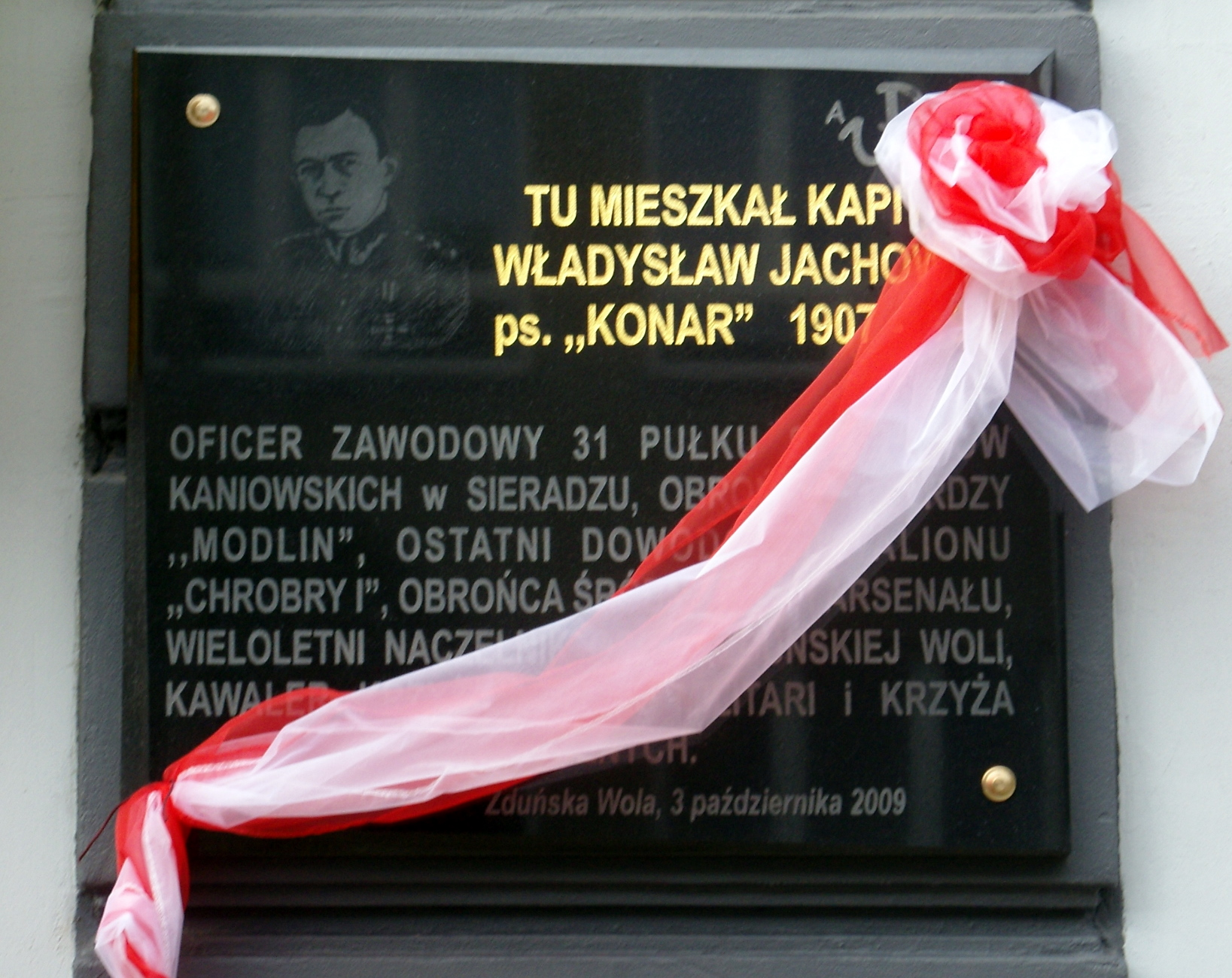 Tablica pamiątkowa ku czci kpt. Władysława Jachowicza ps. "Konar" umieszczona na budynku w którym mieszkał w Zduńskiej Woli przy ulicy Dabrowskiego.